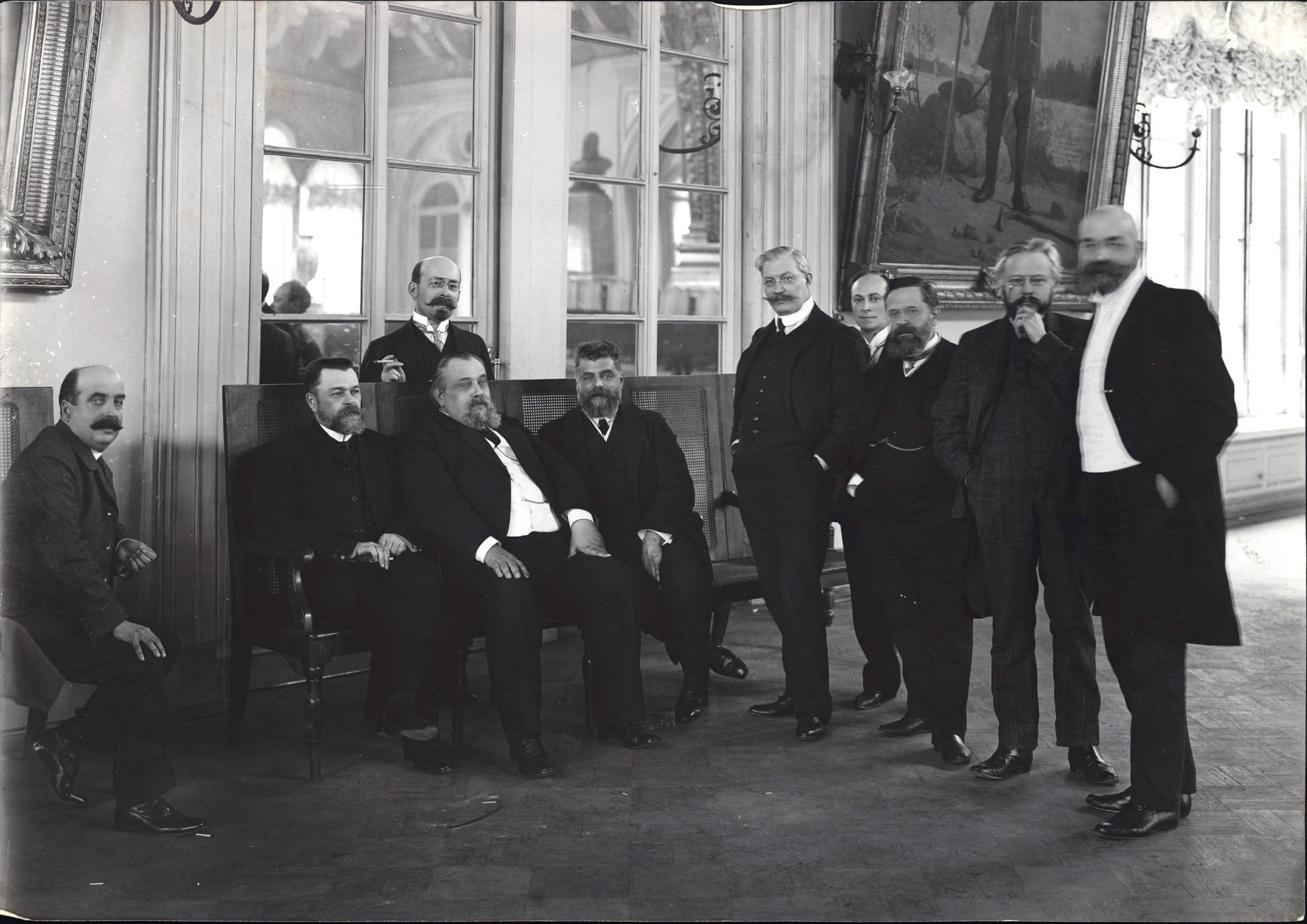 Депутаты Государственной думы Российской империи 1-го созыва и члены партии кадетов Сидят (слева направо): Килевейн, Георгий Робертович Кузьмин-Караваев, Владимир Дмитриевич Ковалевский, Максим Максимович Стахович, Михаил Александрович Стоят (слева направо): Гессен, Иосиф Владимирович Милюков, Павел Николаевич ? ?? Васильев, Александр Васильевич Корнилов, Александр Александрович Стахович, Александр Александрович